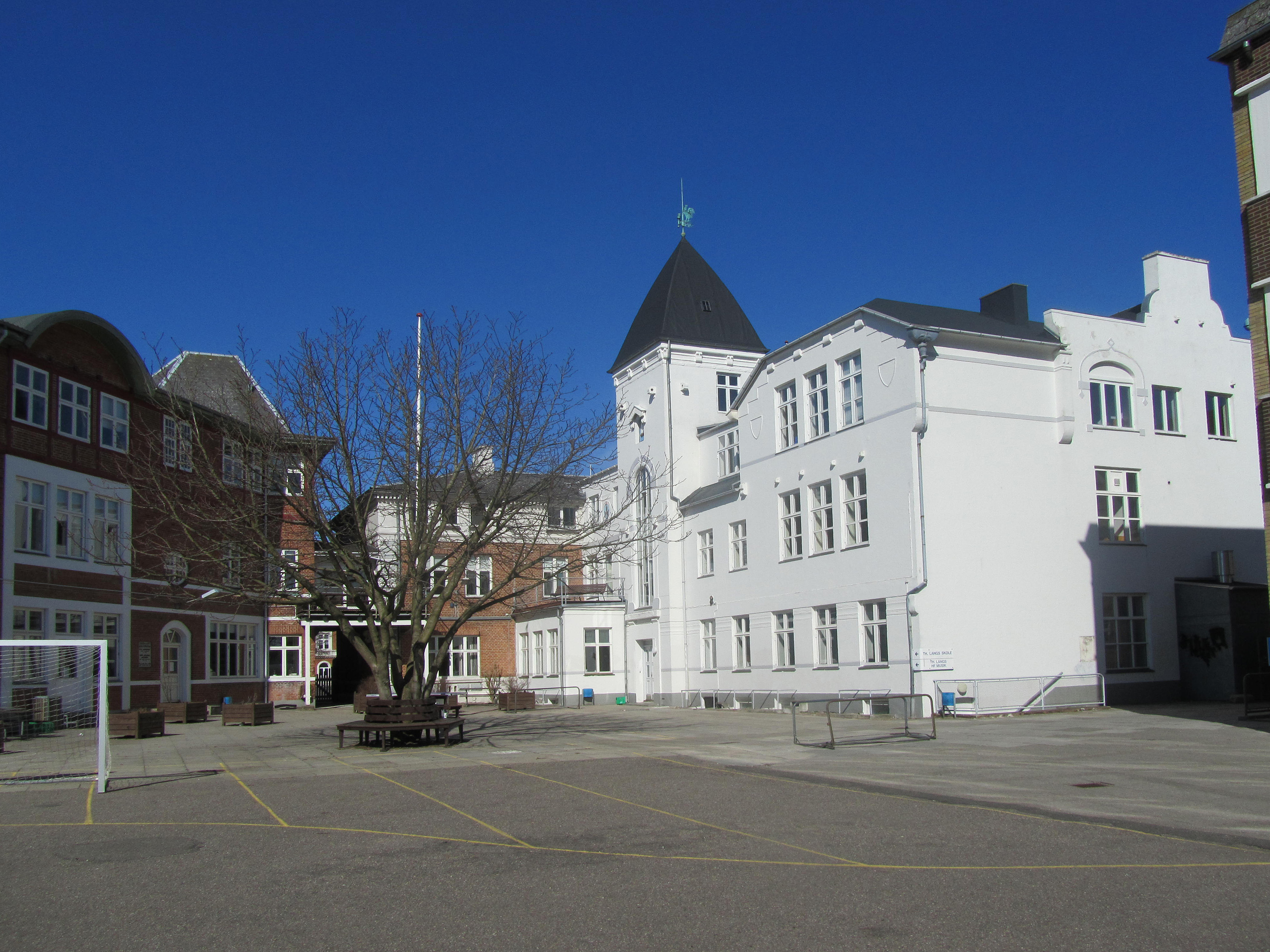 Th. Langs Skoler på Skoletorvet i Silkeborg. Set fra skolegården